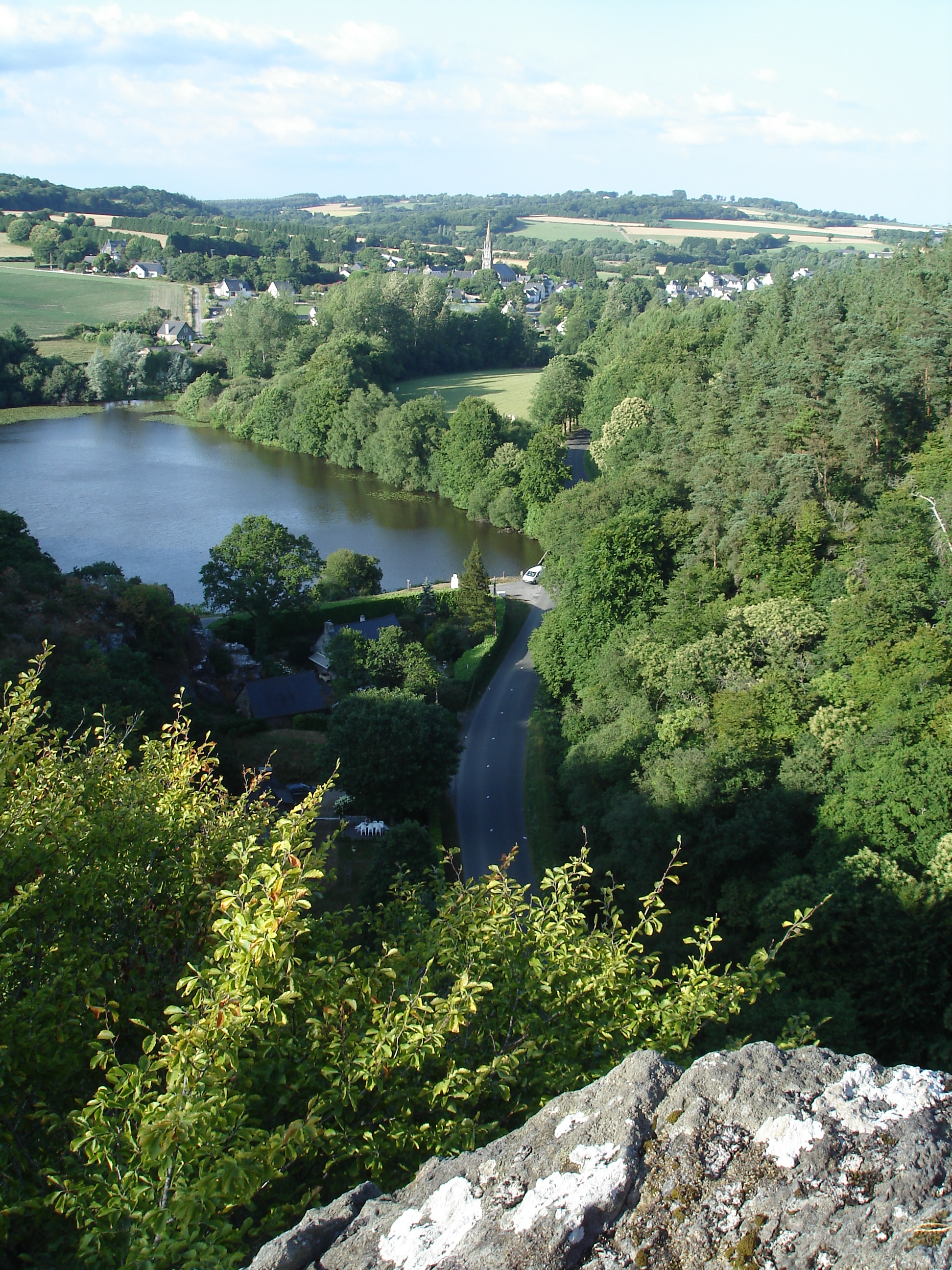 Saint Gilles Vieux Marché - Etang de Poulancre